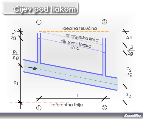 Cijev pod tlakom - Bernoullieva jednadžba